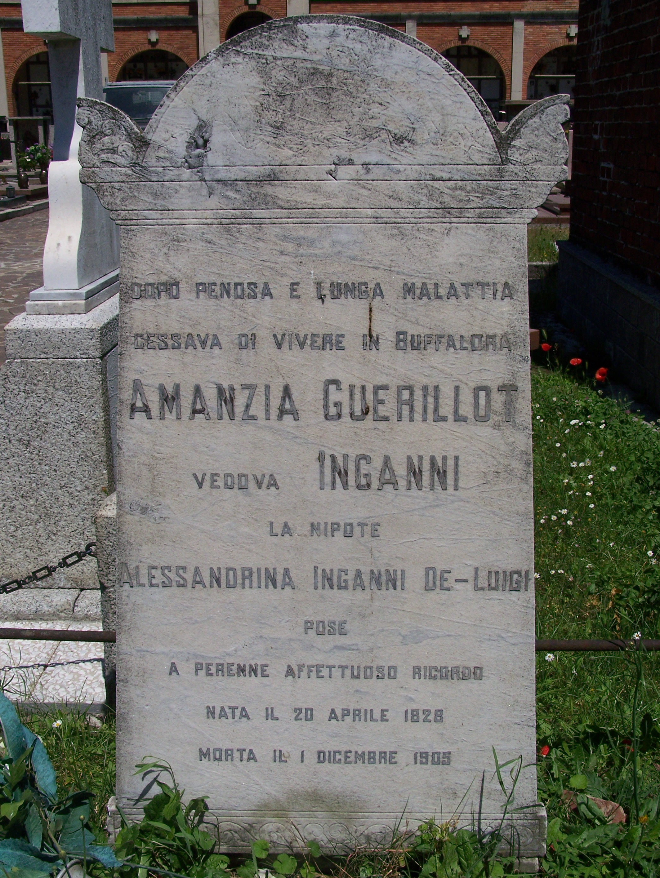 Tomba della pittrice Amazia Guerillot